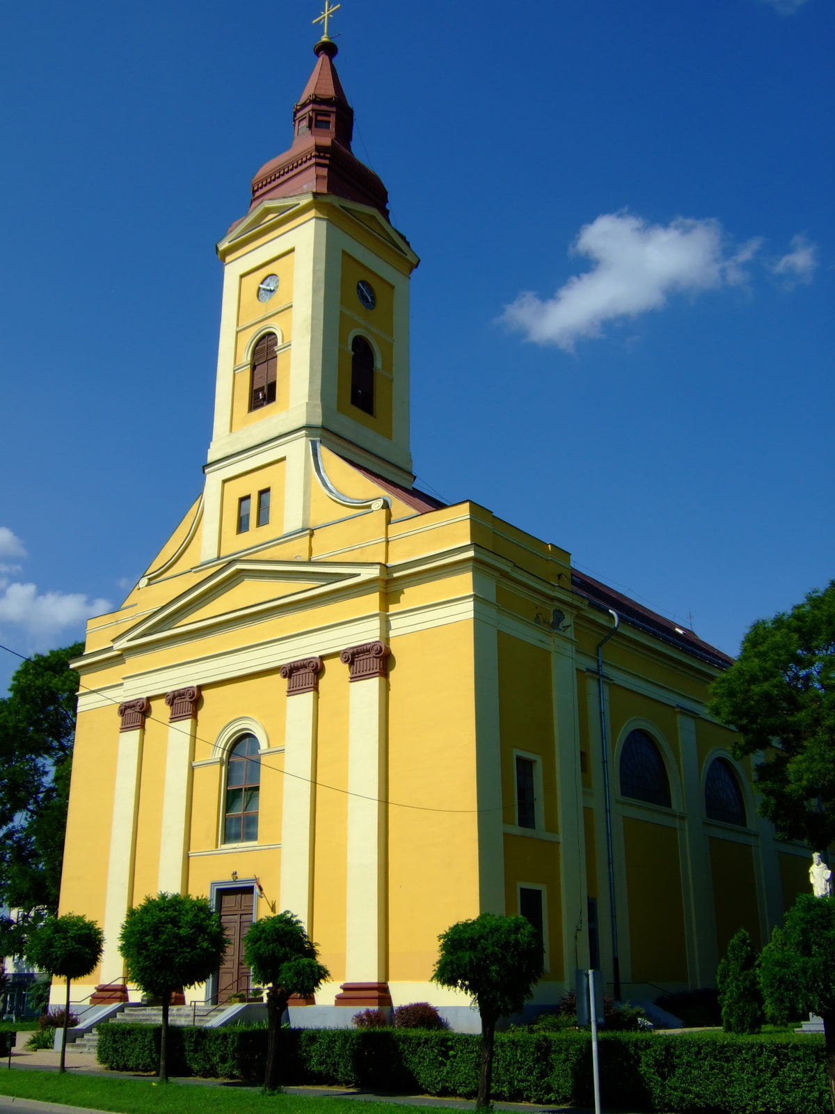 Nagyboldogasszony római katolikus templom (Polgár, Brankovics tér) This is a photo of a monument in Hungary, Identifier: 5380